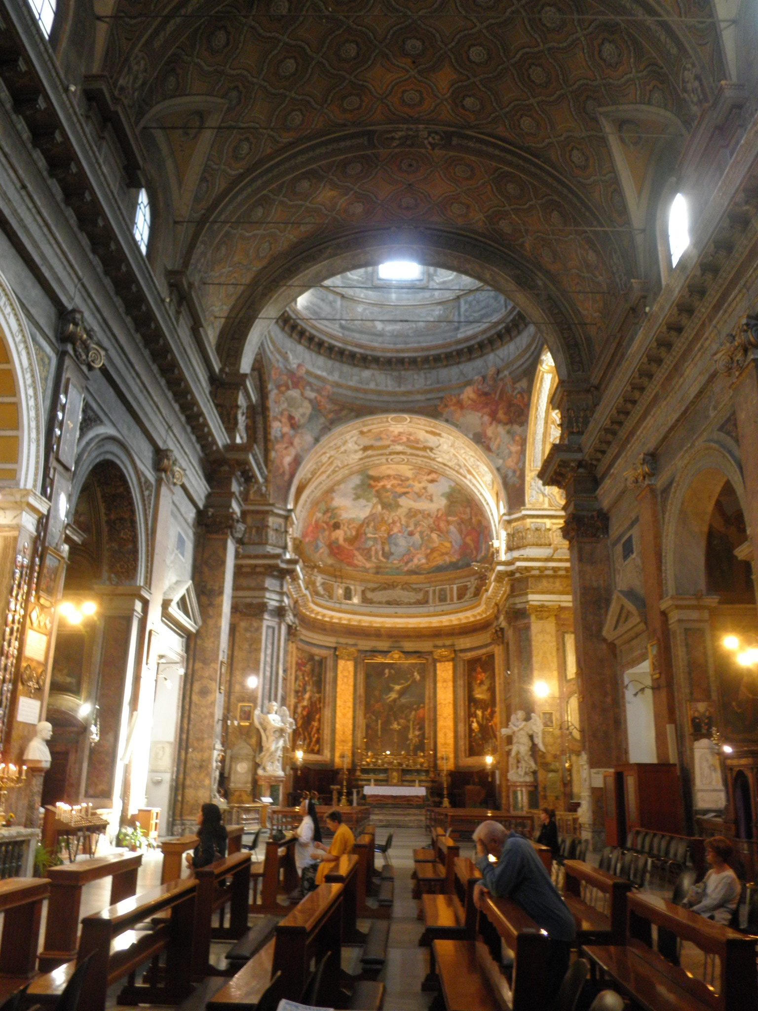 Roma, sant'Andrea delle Fratte, interno